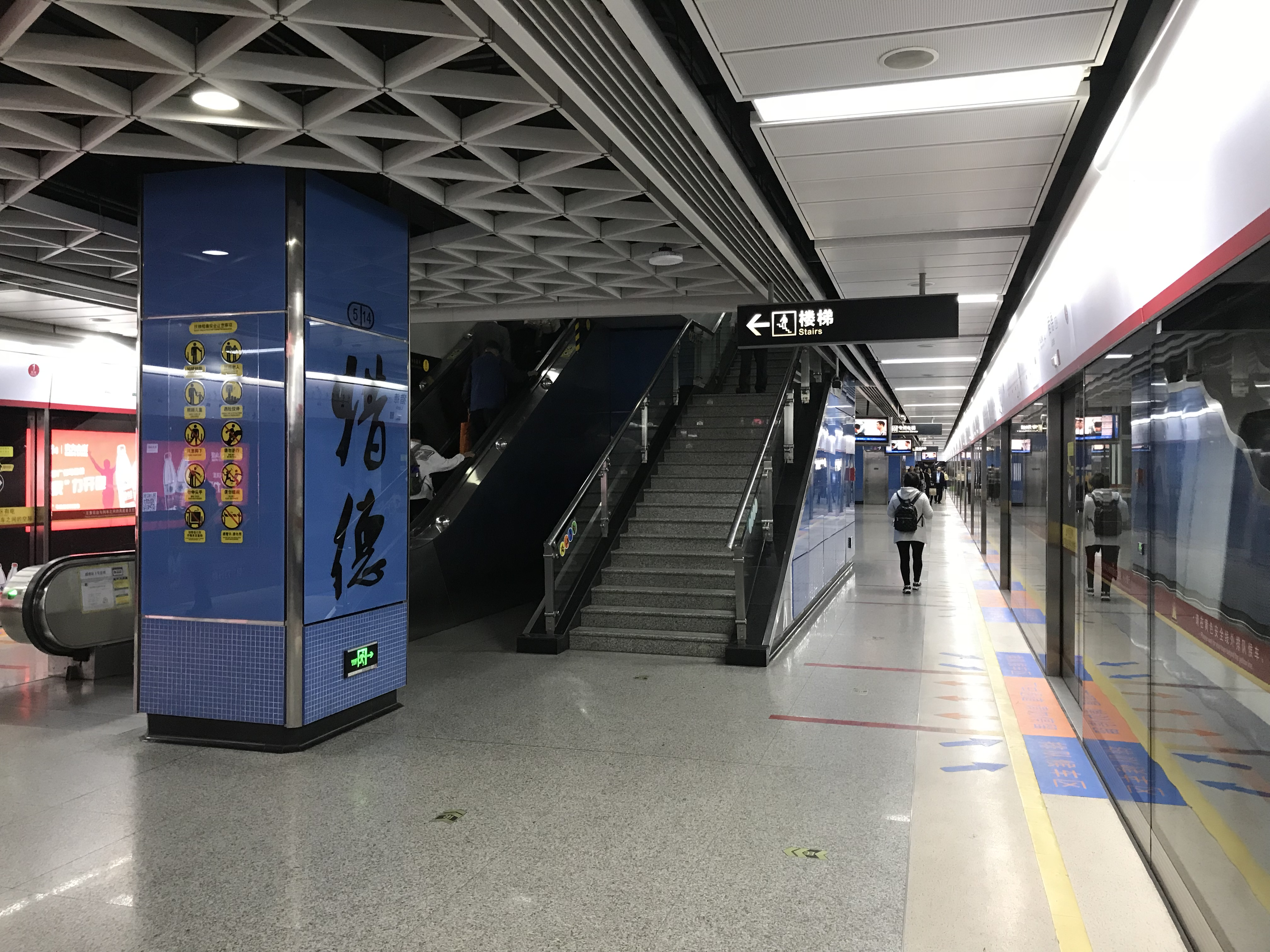 广州地铁猎德站